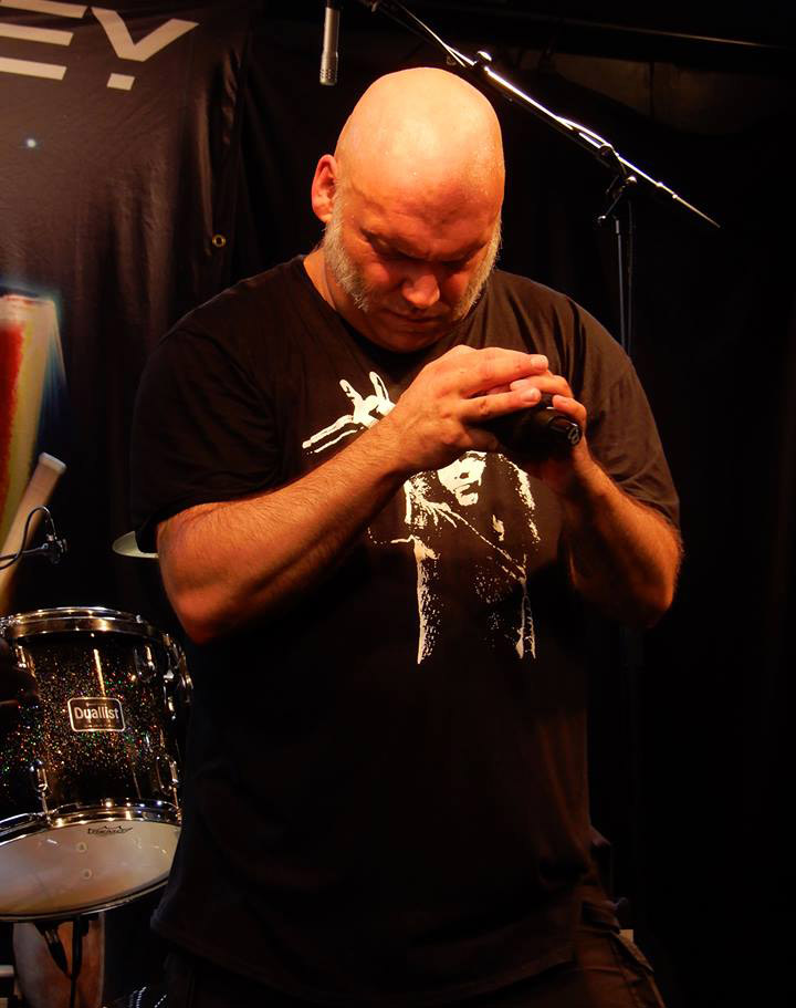 Blaze Bayley Chez Paulette France 2018